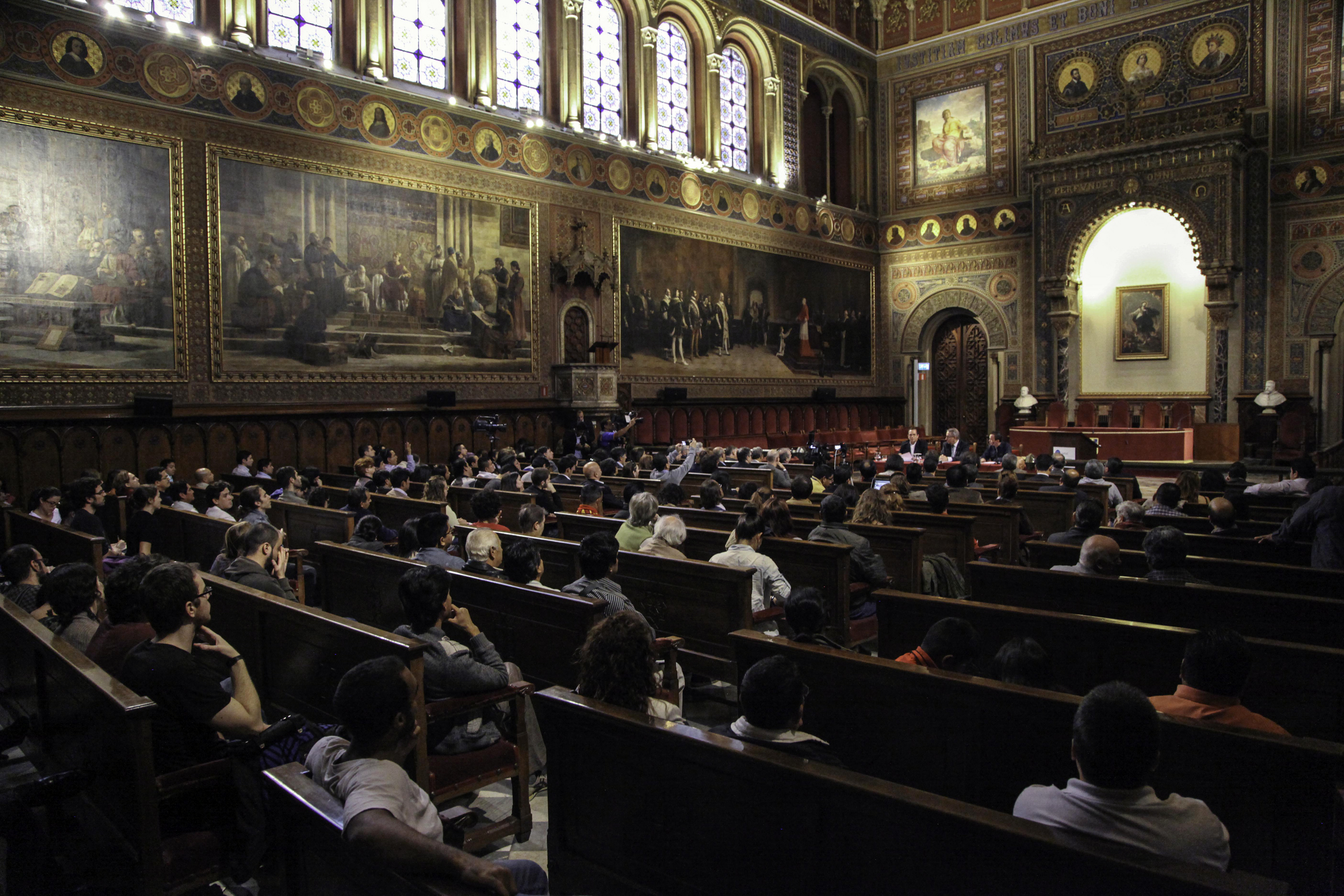 Barcelona (España), 04 de noviembre 2013. El Canciller Ricardo Patiño ofreció una conferencia magistral en el Aula Magna de la Universidad de Barcelona, ante jóvenes estudiantes, migrantes, en general sociedad civil.